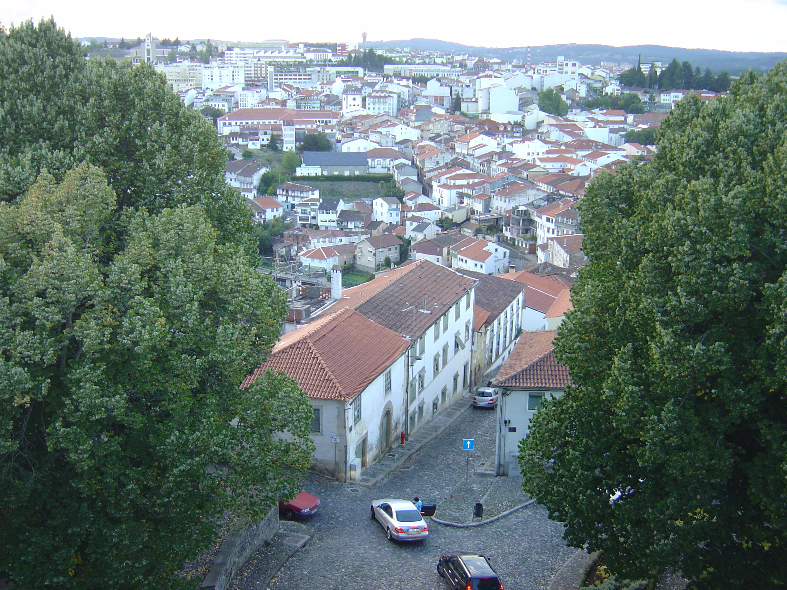 Bragança, Portugal